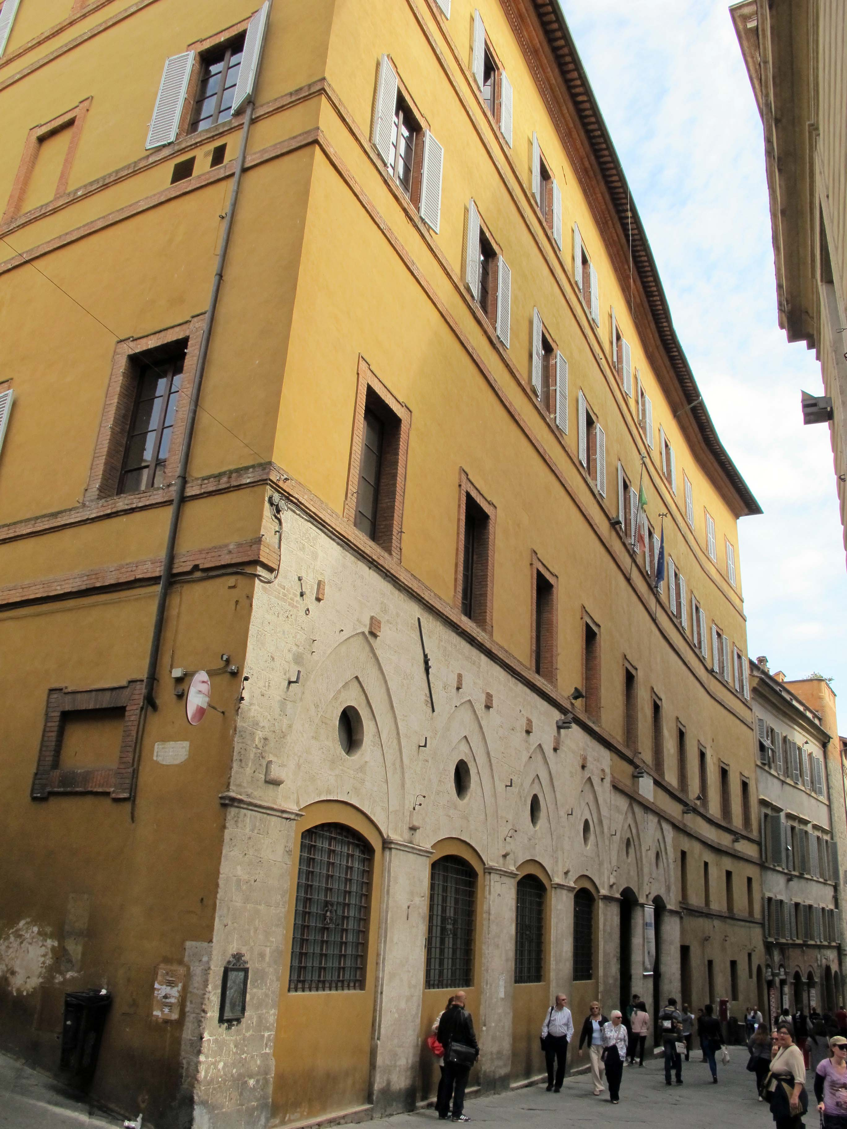 Banchi di Sotto, Siena